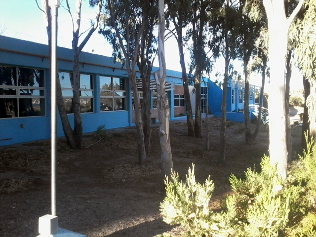 UNPSJ sede Madryn